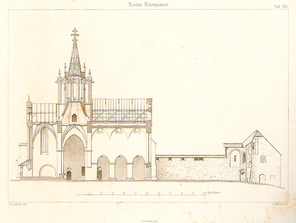 Das Buch Die Kunst des Mittelalters in Schwaben. Lieferung 6. Die Cisterzienser-Abtei im Schönbuch, Stuttgart 1858, Tafel XIX. Querschnitt der Klosterkirche Bebenhausen